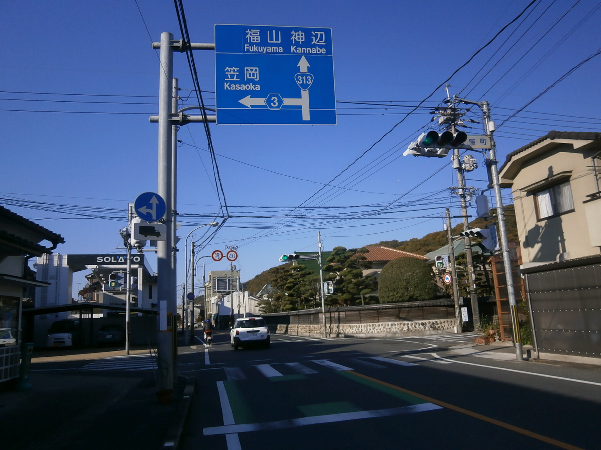 岡山県井原市高屋にある高屋交差点